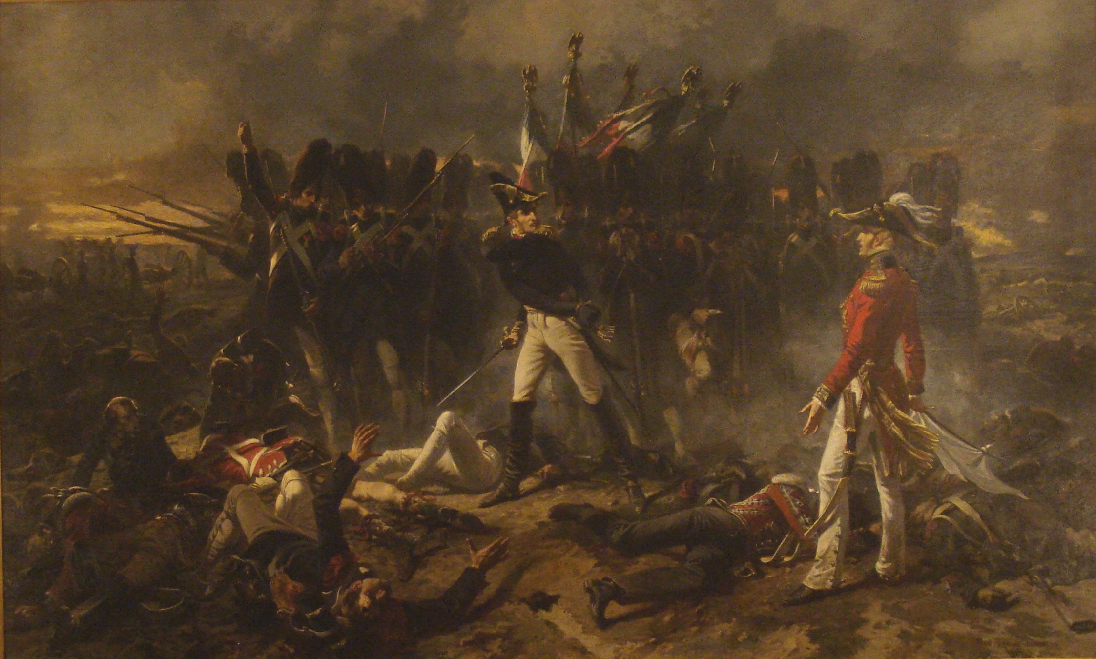 Le plus célèbre et le plus grand tableau d'Armand Dumaresq (2,50m x 1,50 m) commandé par Napoléon III pour l'Exposition Universelle de 1867.